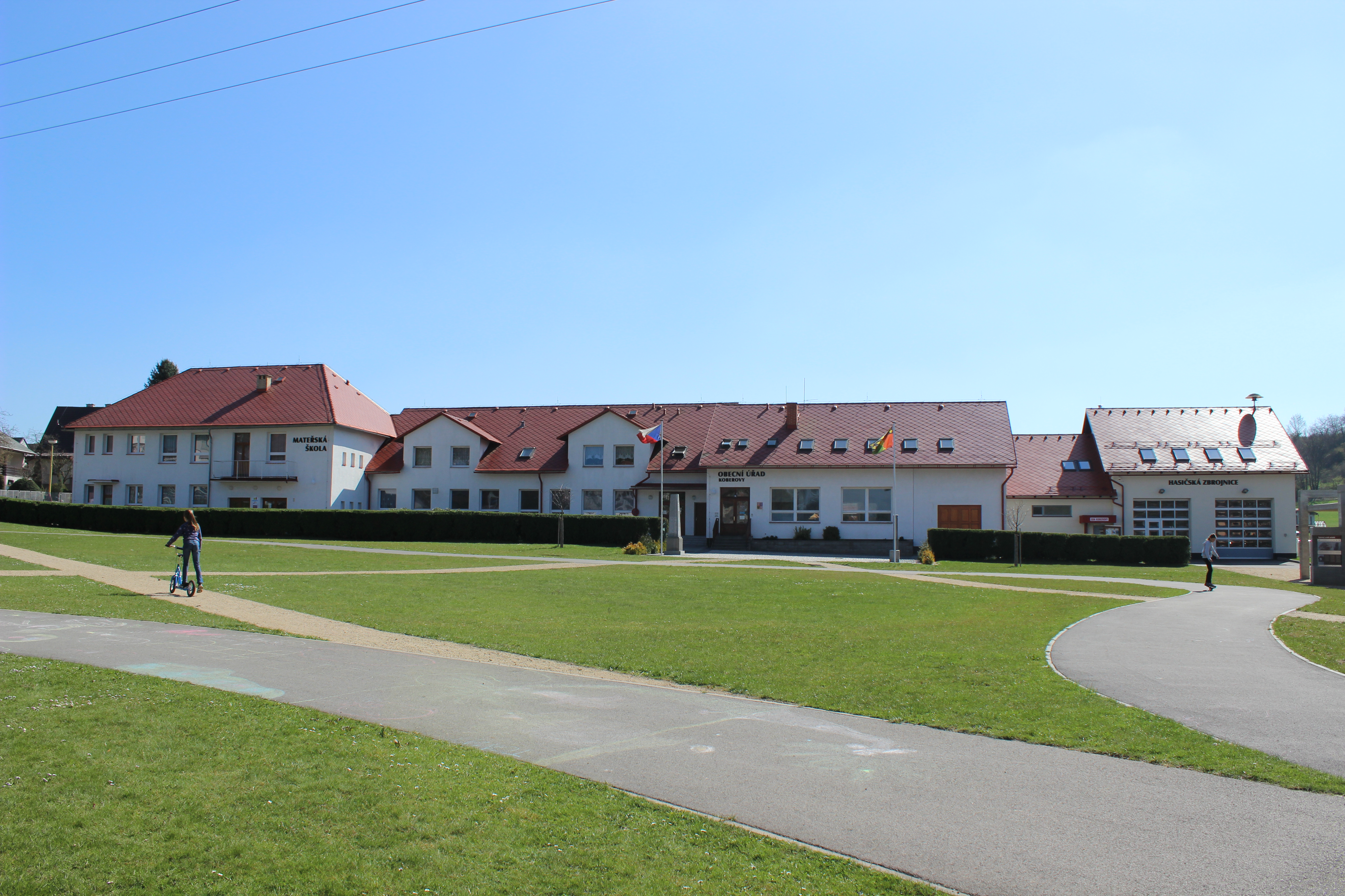 Budovy veřejných služeb v obci Koběrovy, součásti okresu Jablonec nad Nisou.